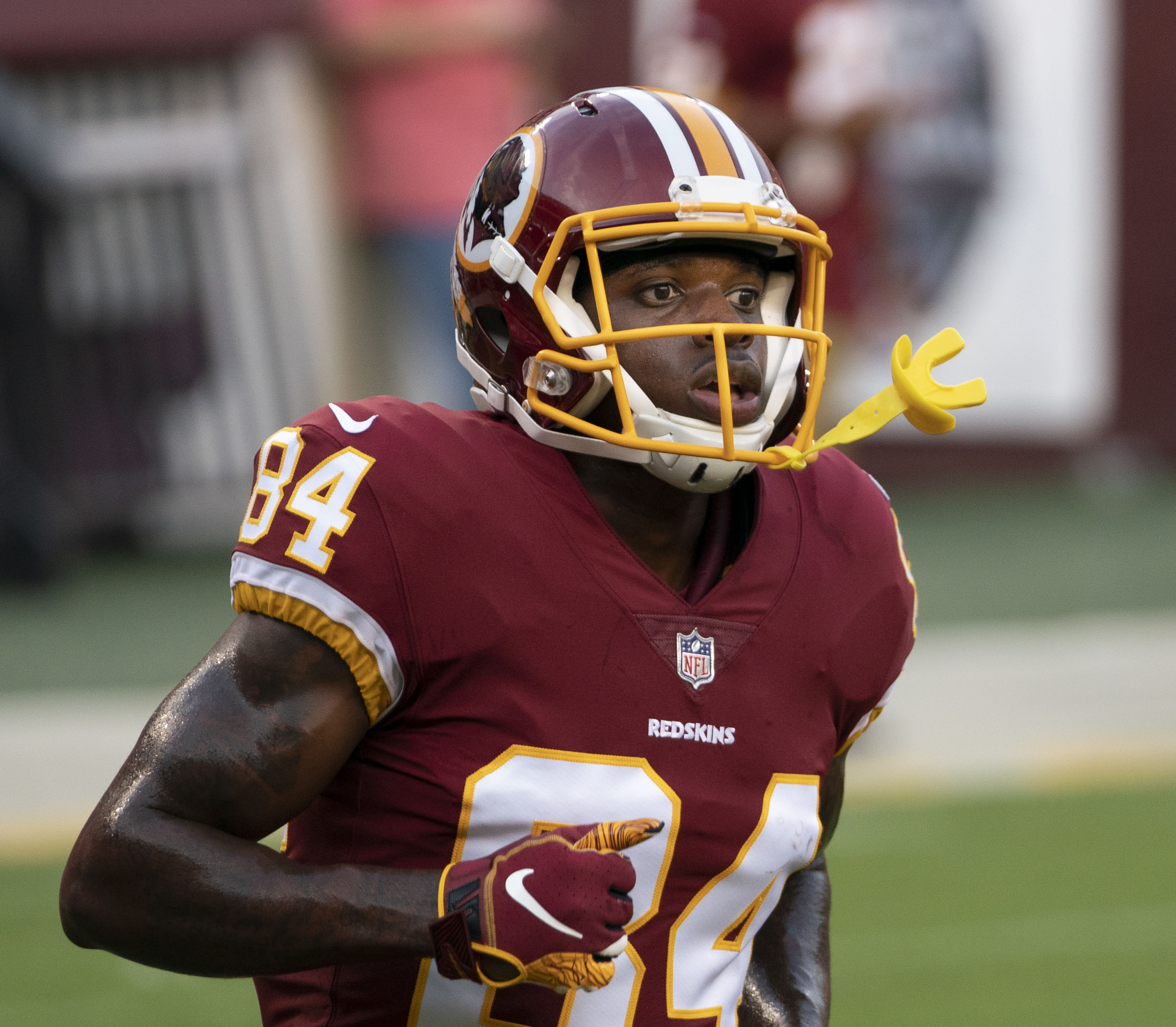 Jets at Redskins 8/16/18